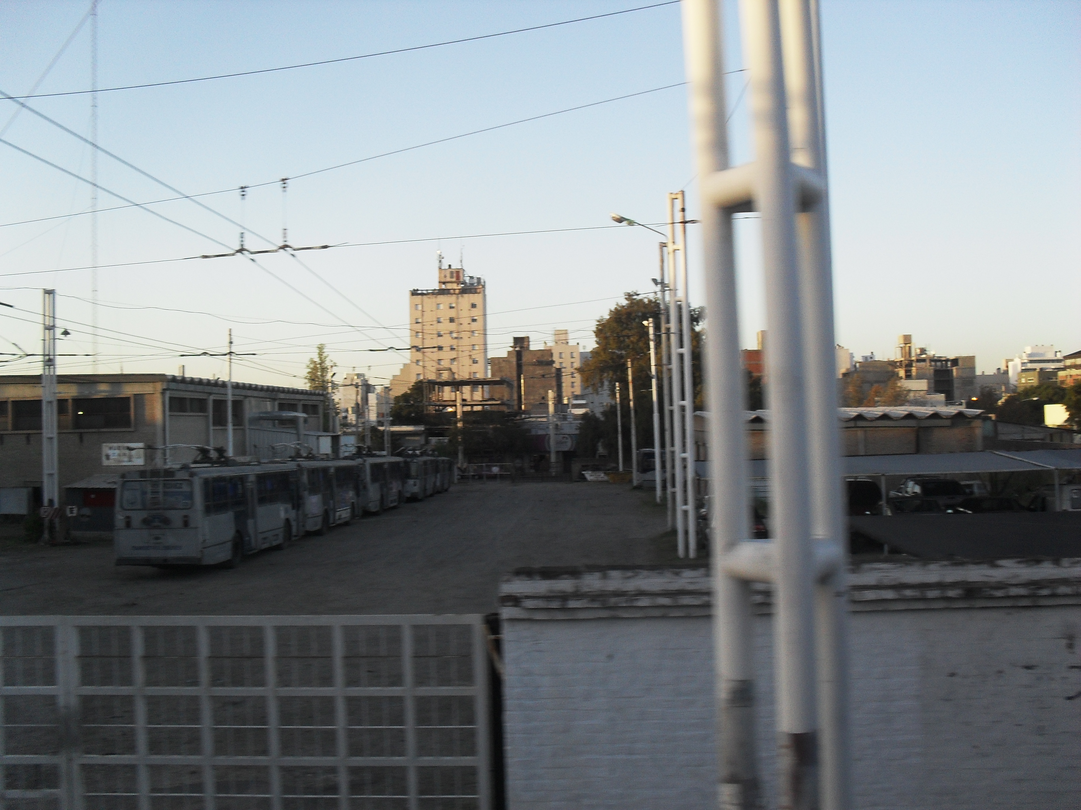 Depósitos de trolebuses de la ciudad de Córdoba (Argentina).